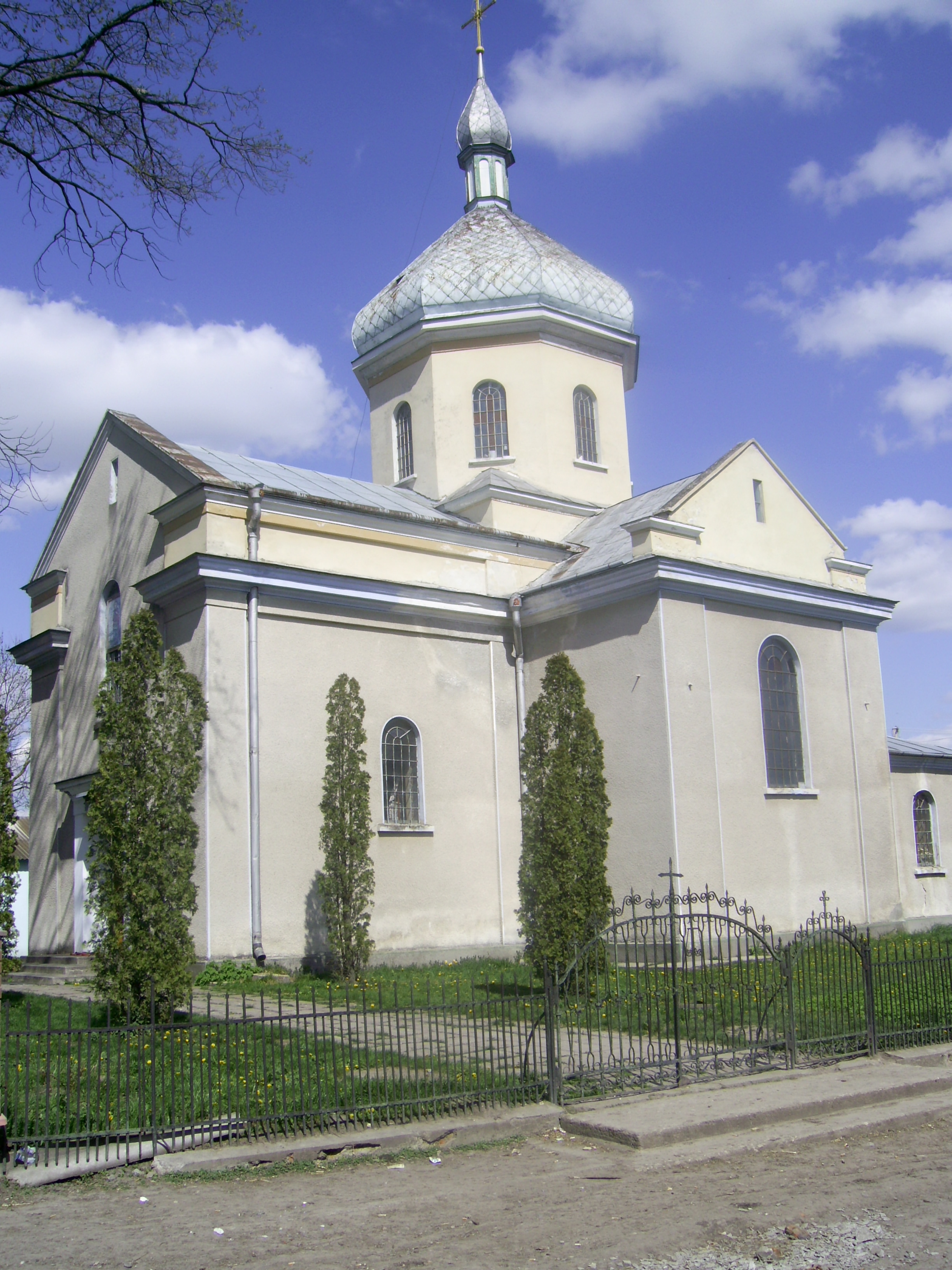 Вигляд церкви (храму) святого Димитрія в. селі Сорока. В цьому Храмі був парохом Микола Цегельський.